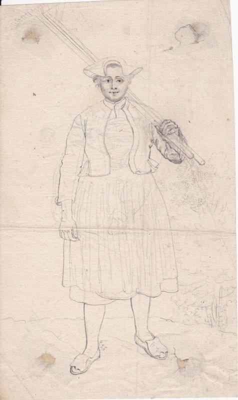 Samuel Gränicher. Hauensteinerin, Vorzeichnung zu dem Kupferstich: La Femme de la Foret noire, 1783